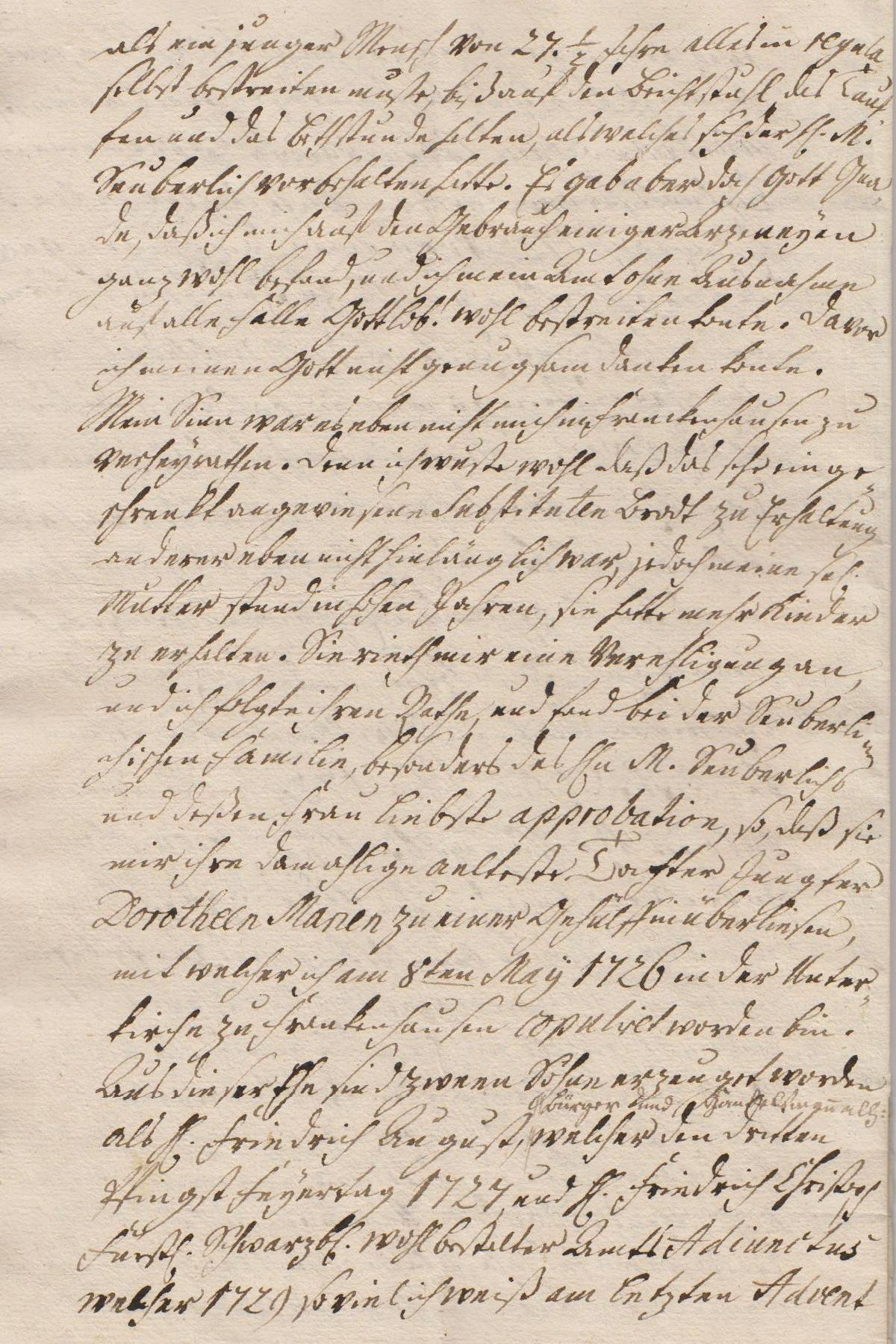 Seite 8 der Leichenpredigt für den Pastor August Wilhelm Reinhart (1696/1770), Bürger der Stadt Heringen an der Helme.